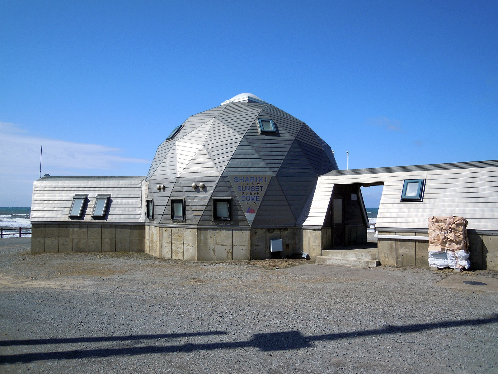 青森県つがる市にあるしゃりきサンセットドームの外観。